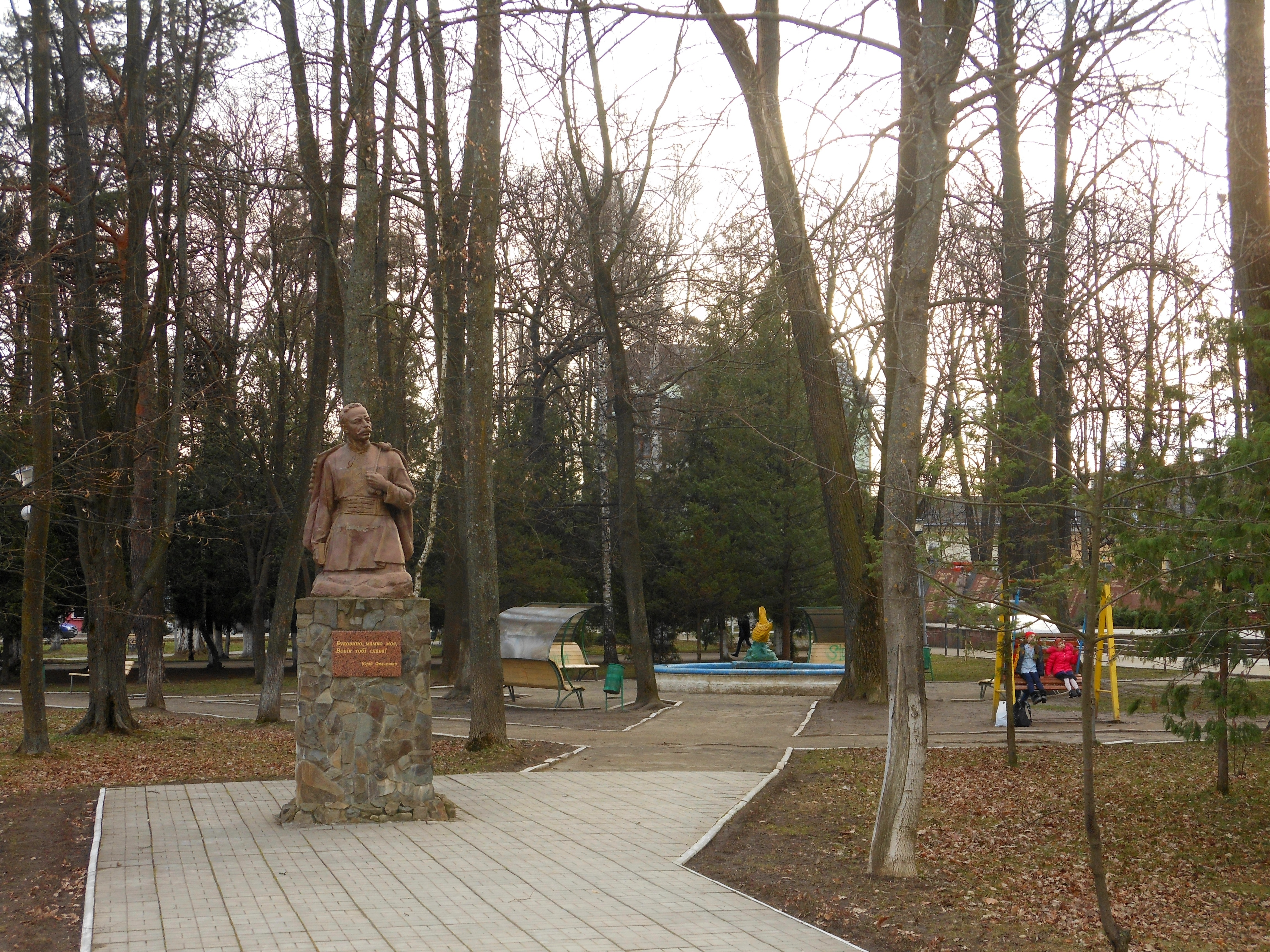 Пам'ятник Федьковичу Ю. А. — українському письменнику, Сторожинець, парк ім. Ю. Федьковича